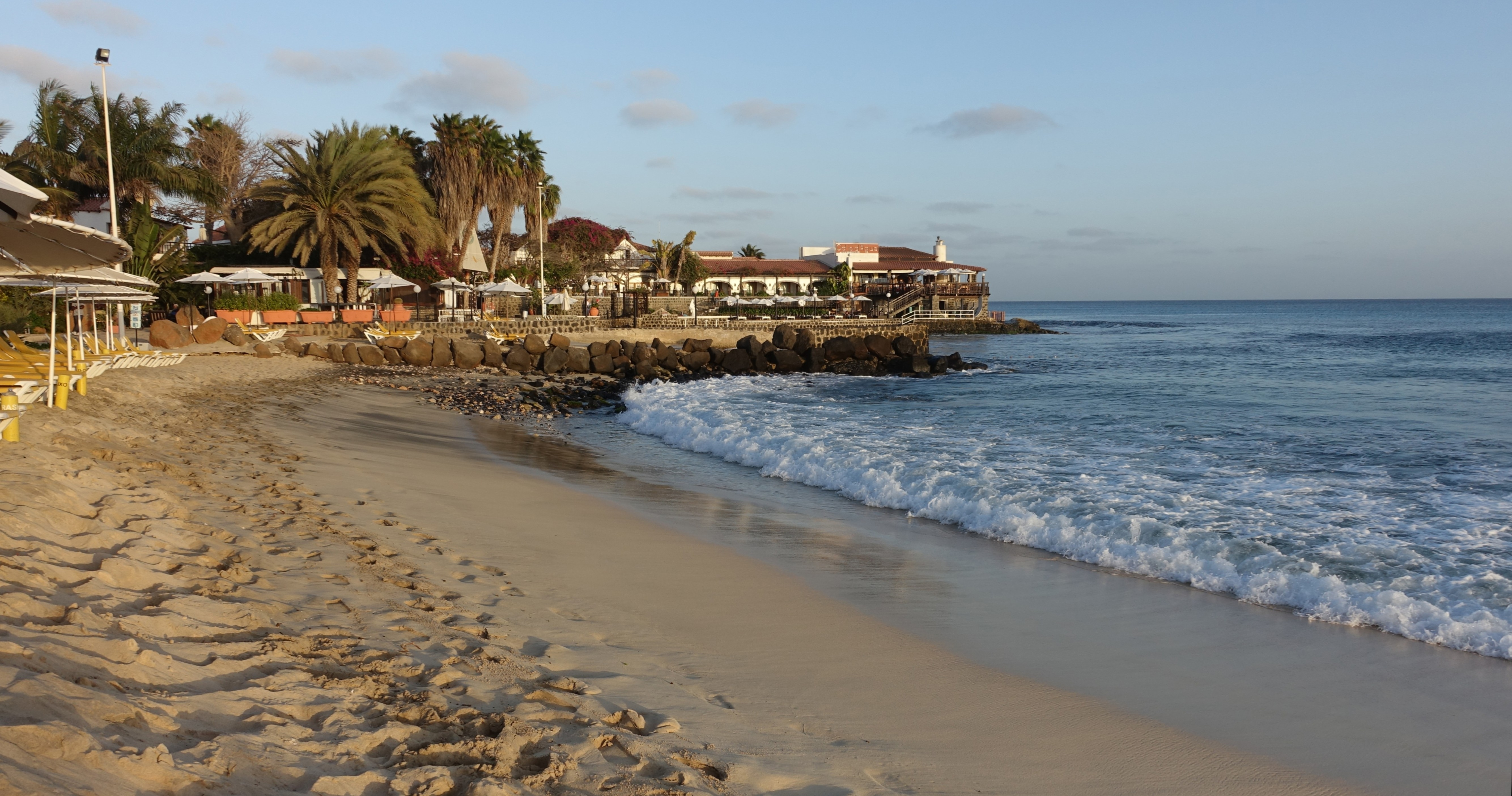 Santa Maria - Strand mit Atlantikwelle